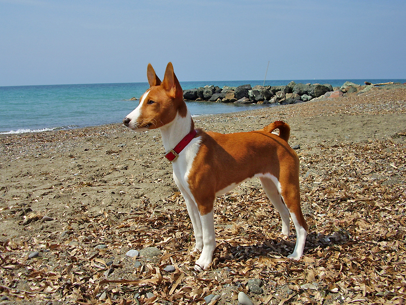 al mare in Toscana Basenji